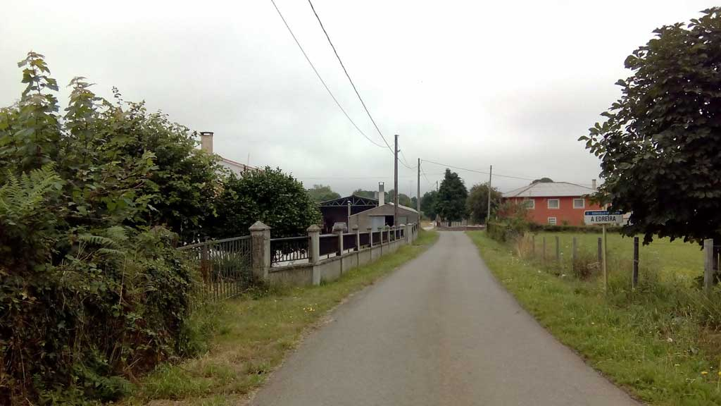 Vista da Hedreira, Curtis.